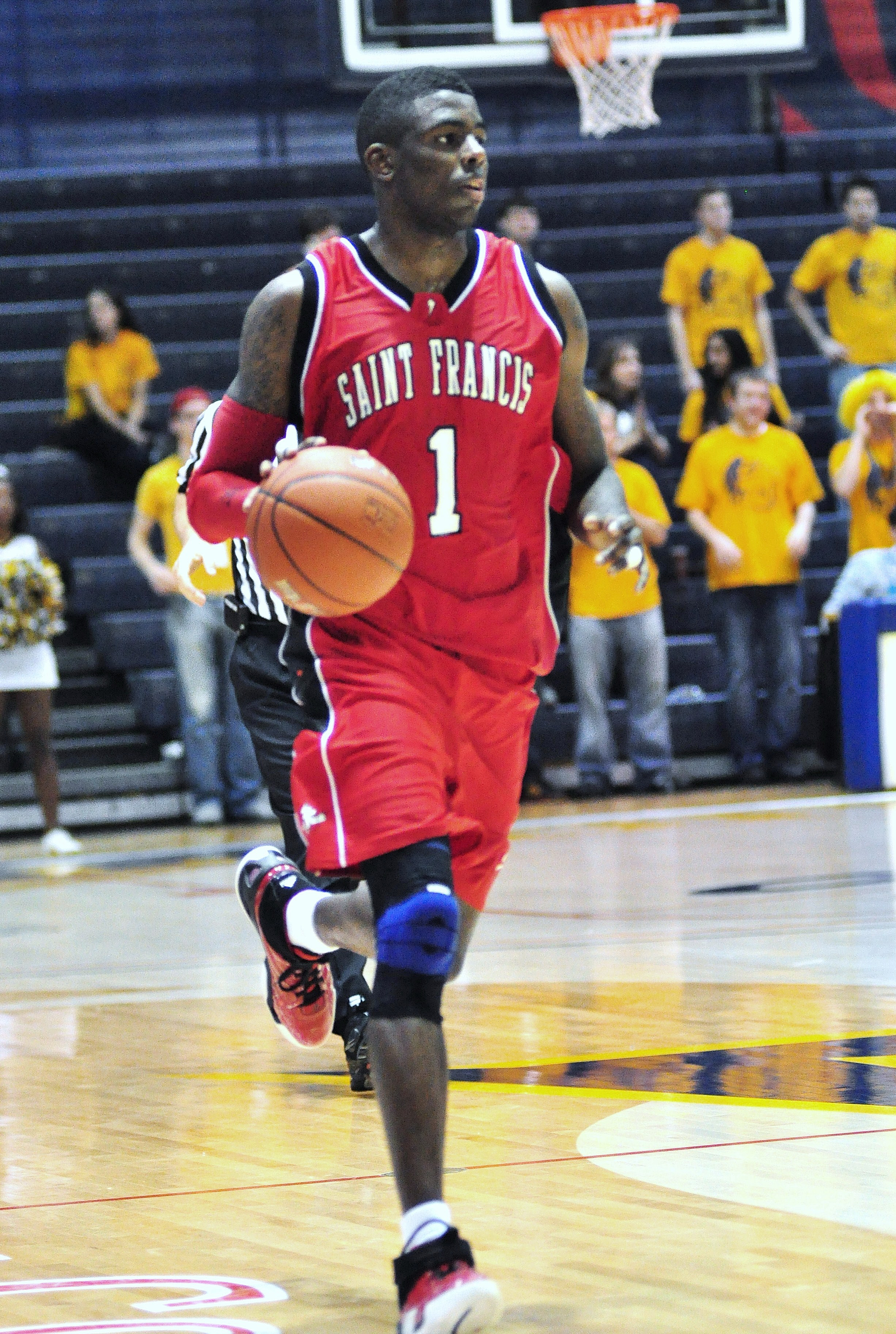 1 Devin Sweetney